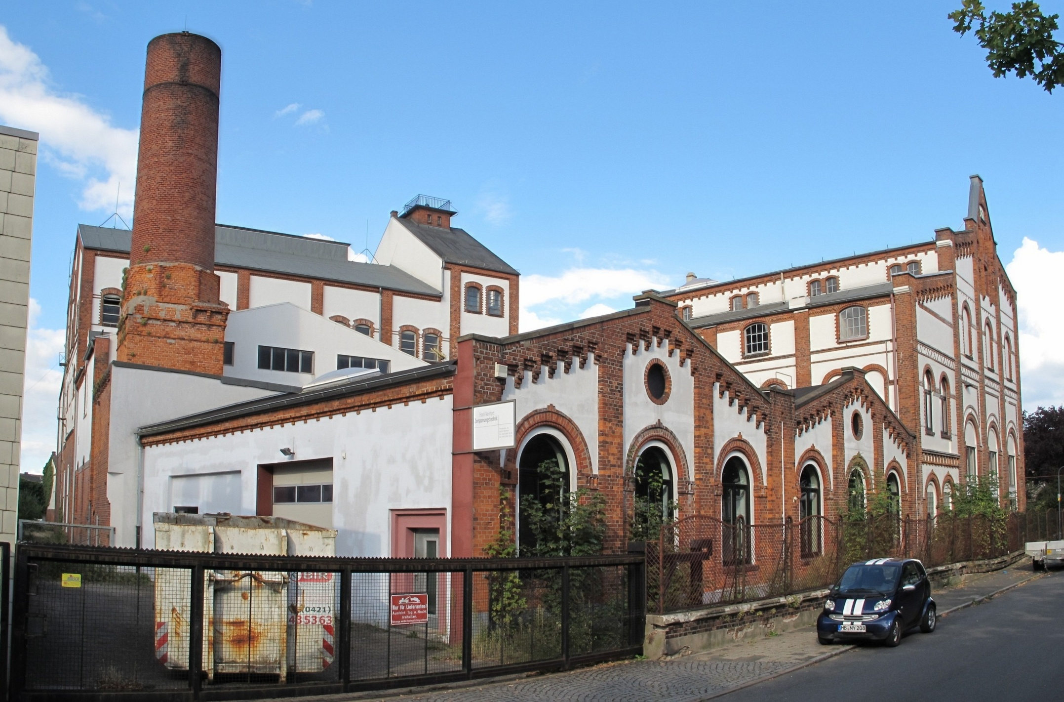 Union-Brauerei in Bremen, Theodorstraße 12Das abgebildete Objekt ist ein geschütztes Kulturdenkmal in der Freien Hansestadt Bremen, mit der Nr. 3421 beim Landesamt für Denkmalpflege registriert.